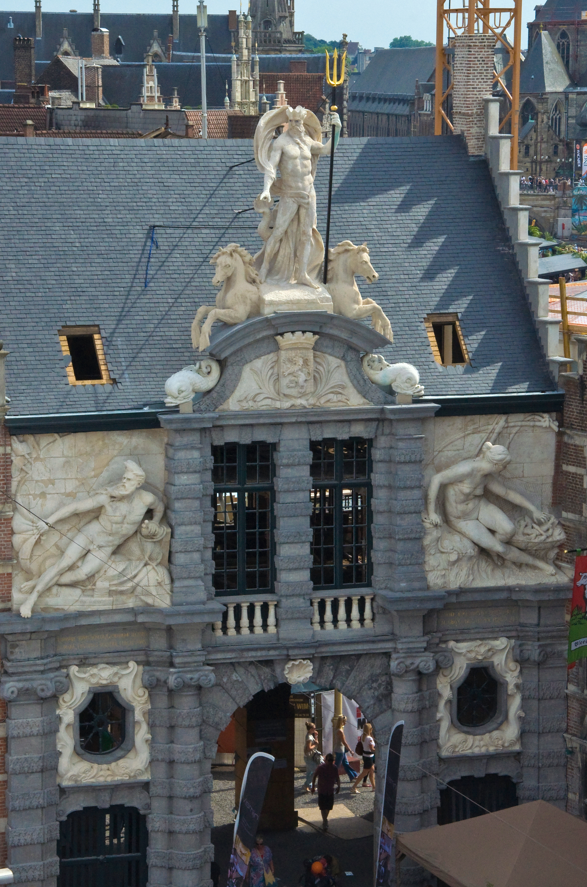 De Oude vismijn te Gent (België)